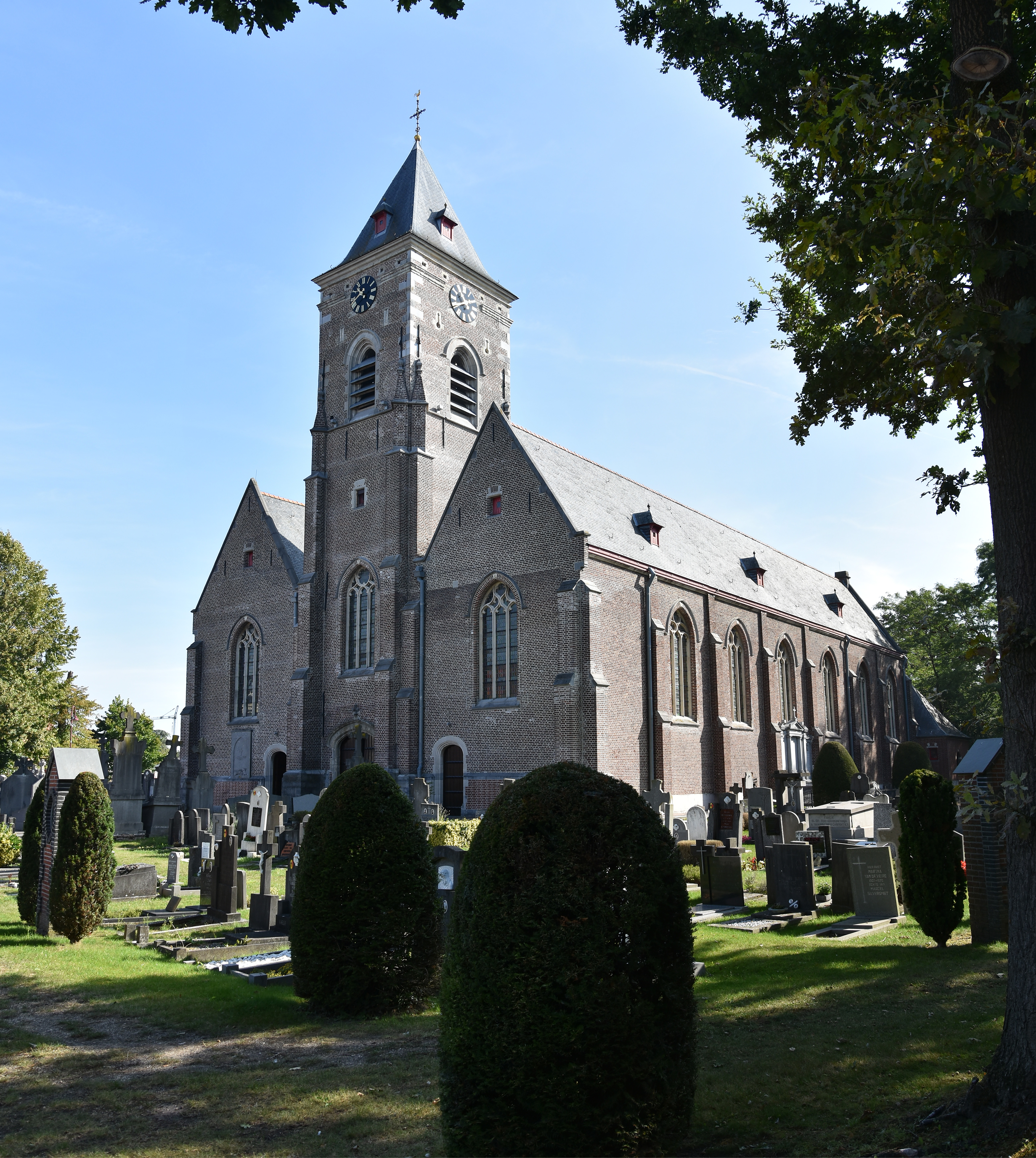 Onze-Lieve-Vrouw Geboortekerk Bellem (97045) 30-08-2019 10-40-07 This photo of immovable heritage has been taken in the Flemish Region